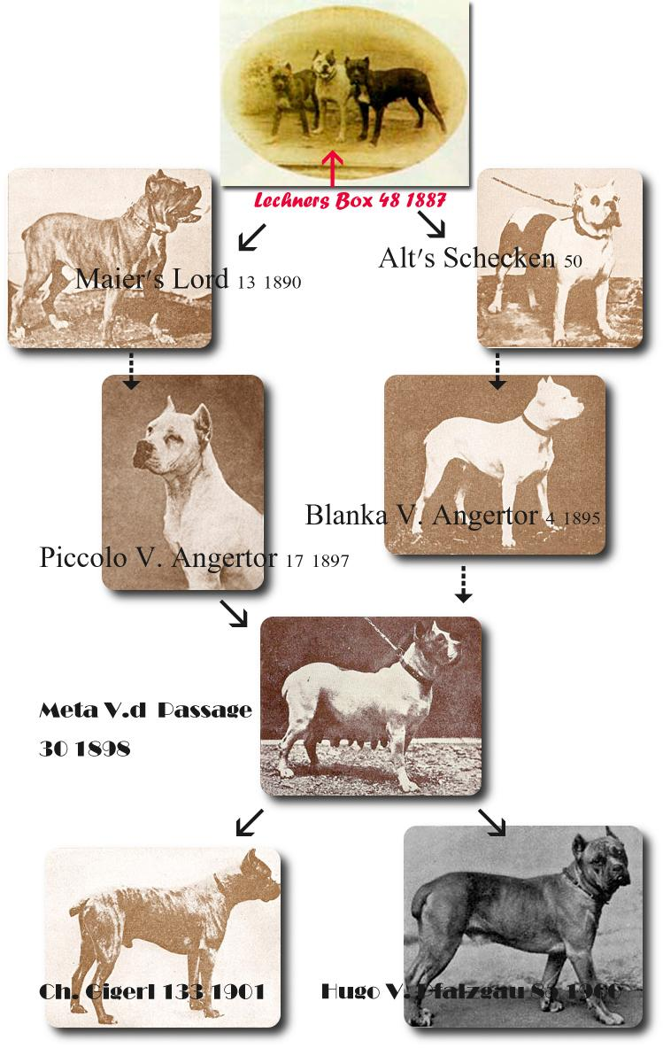 boxer dogs